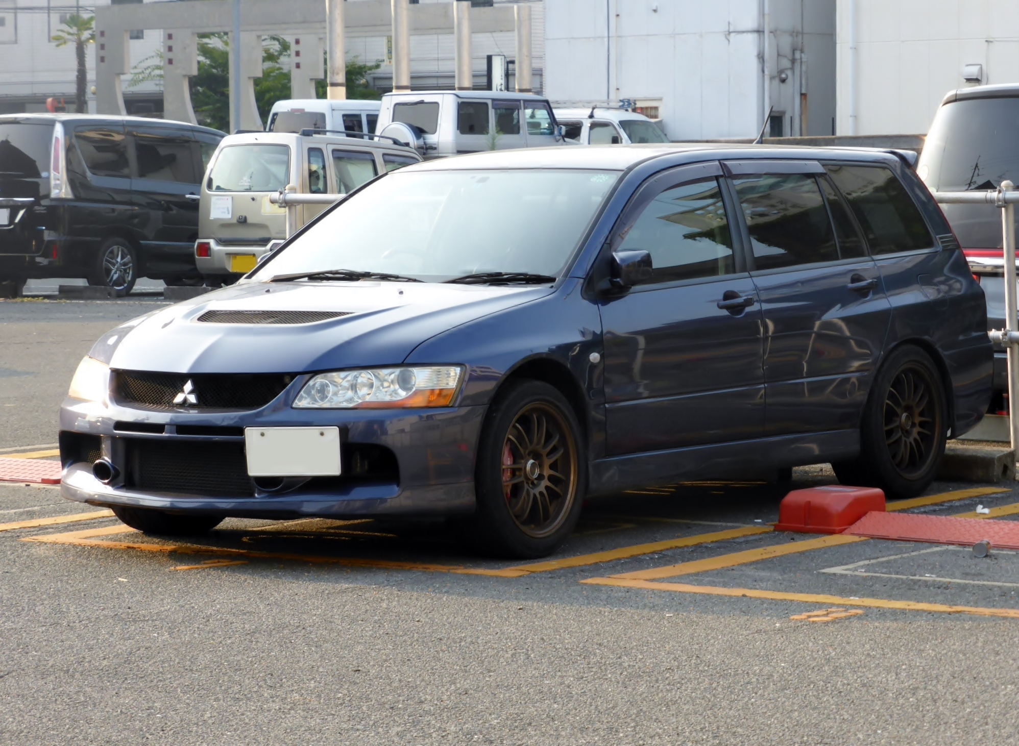 三菱・ランサーエボリューションワゴンGTをフロントから撮影。